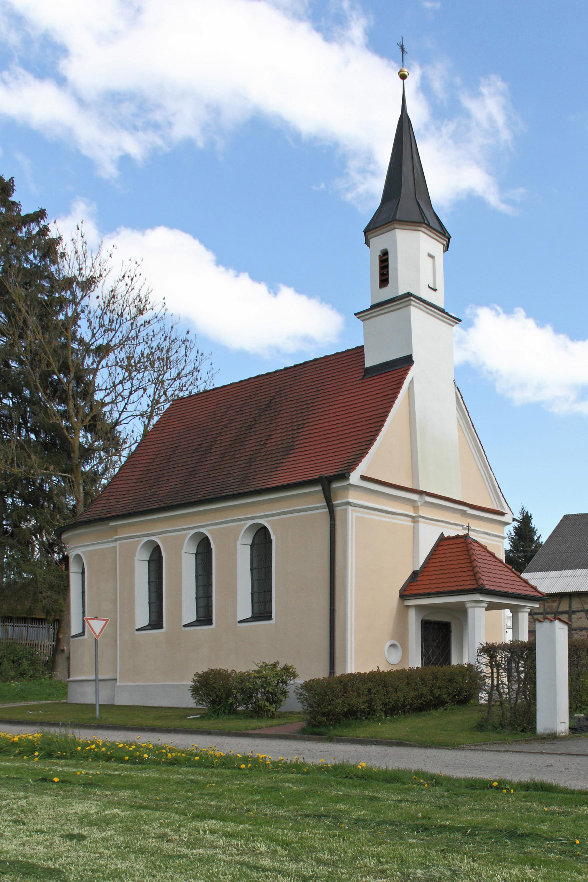 Ansicht der Kapelle von Nordwesten